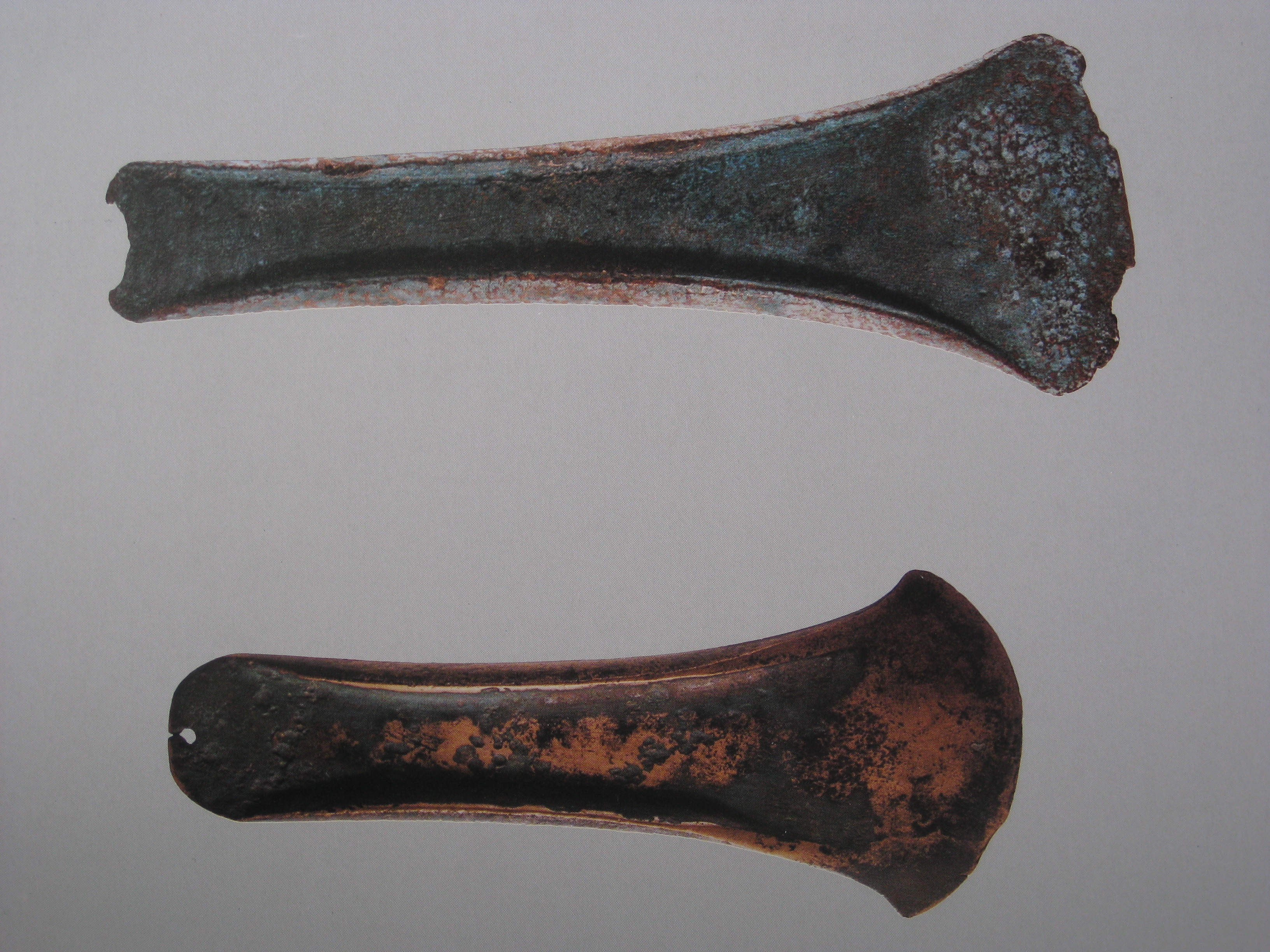 Asce in bronzo, rinvenute a San Lorenzo in Noceto, Forlì, XVII secolo a.C., foto propria.